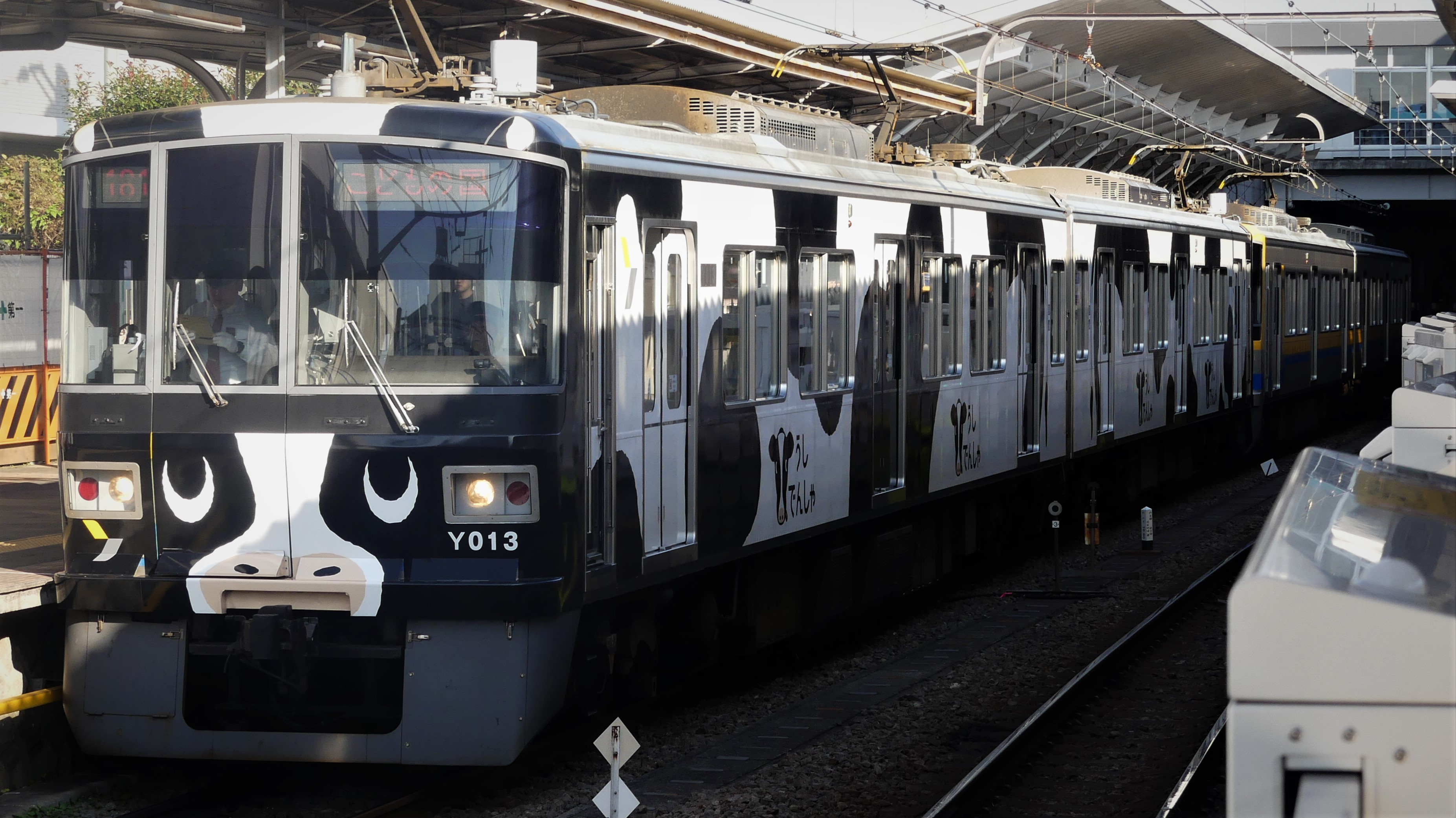 横浜高速鉄道Y000系Y003編成「うしでんしゃ」